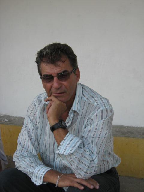 Jair Pereira, conhecido técnico de futebol brasileiro